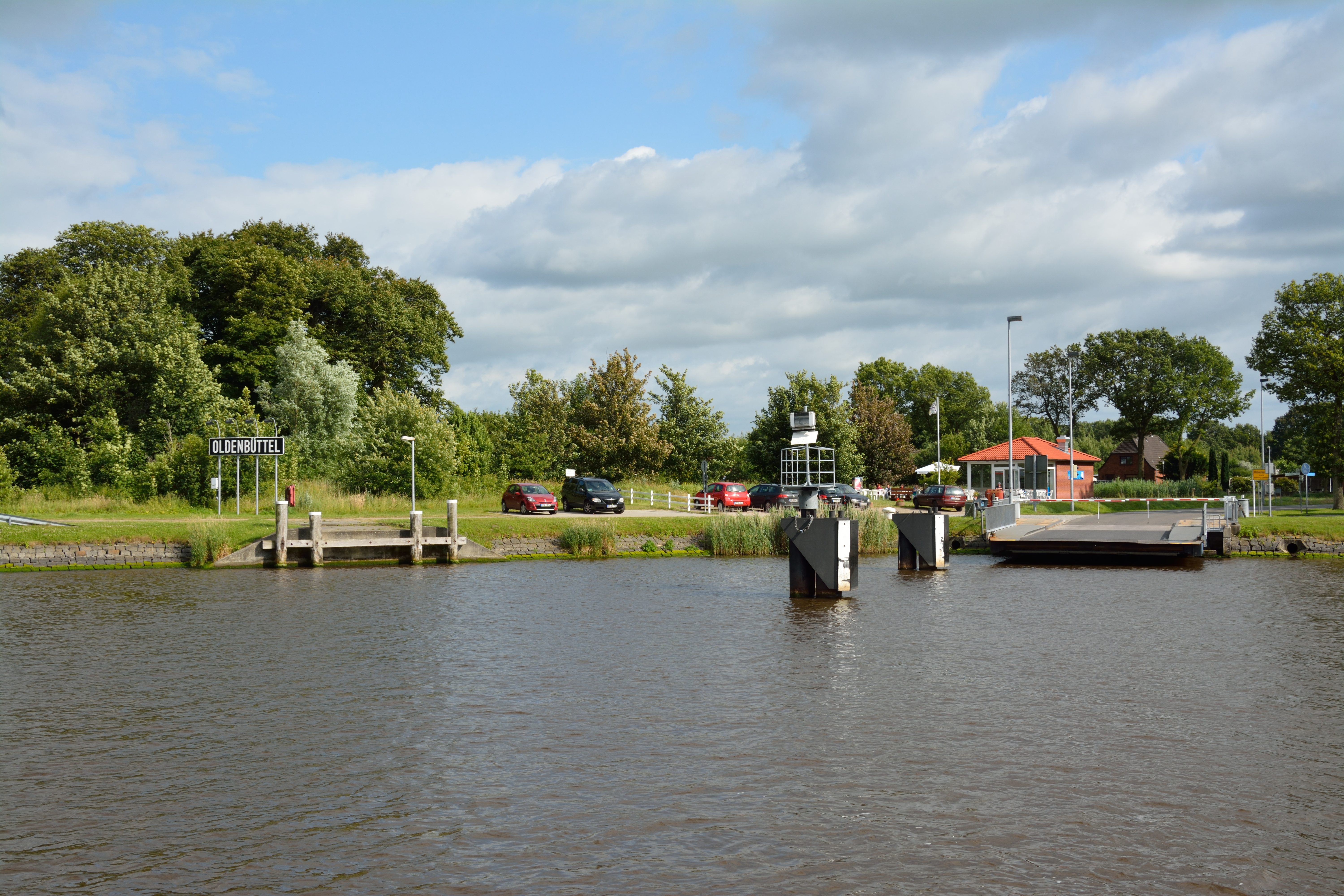 Oldenbüttel, Fähre "Tilsit" über den Nord-Ostsee-Kanal